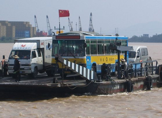 新會新福利巴士过渡西江